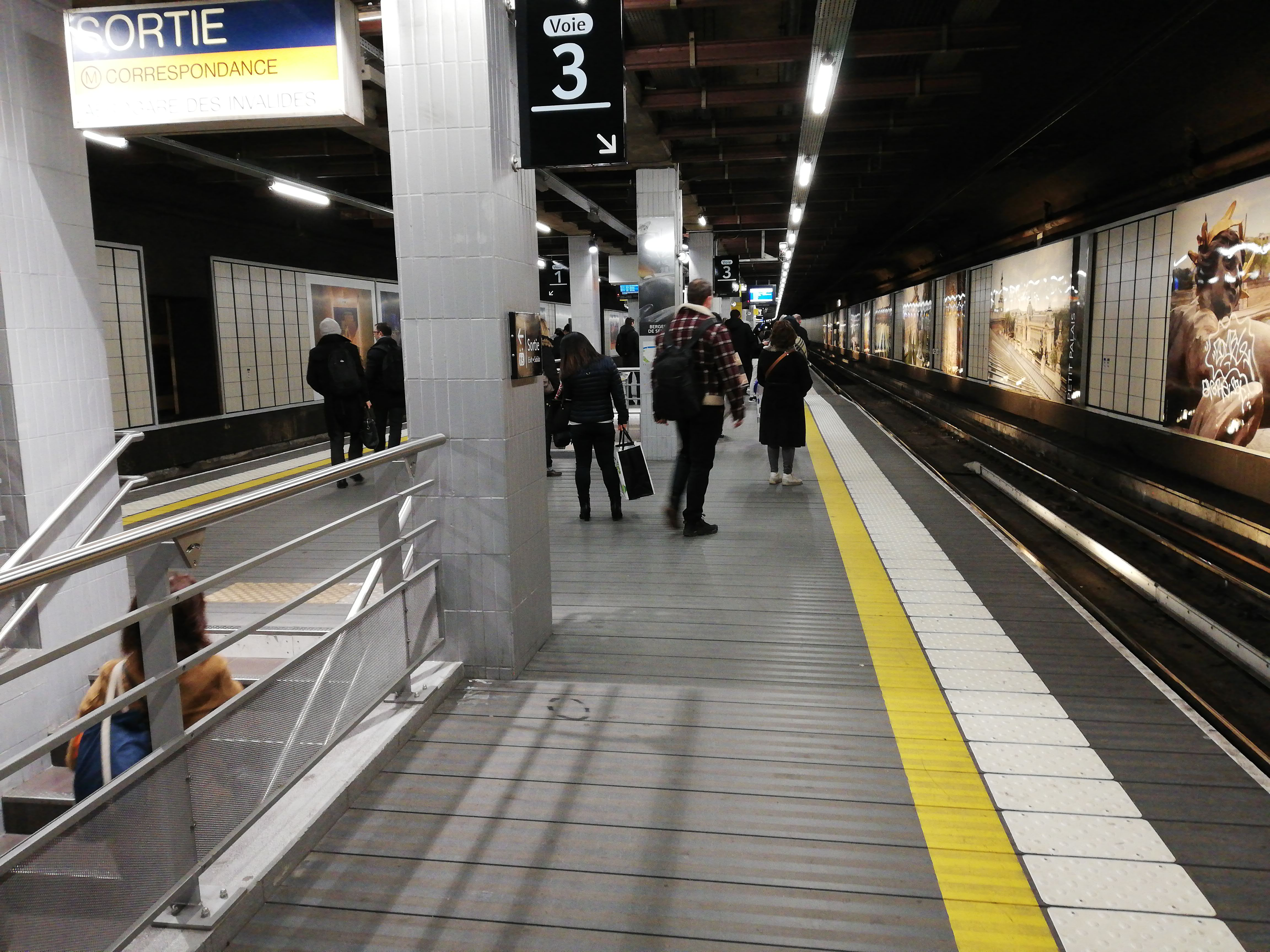 Un quai rénové de la gare des Invalides, en 2018, à Paris 7e, France.